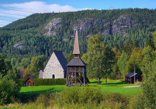 Lidens gamla kyrka, vy från öster. Stegport, kyrka, klockstapel och brudstuga.